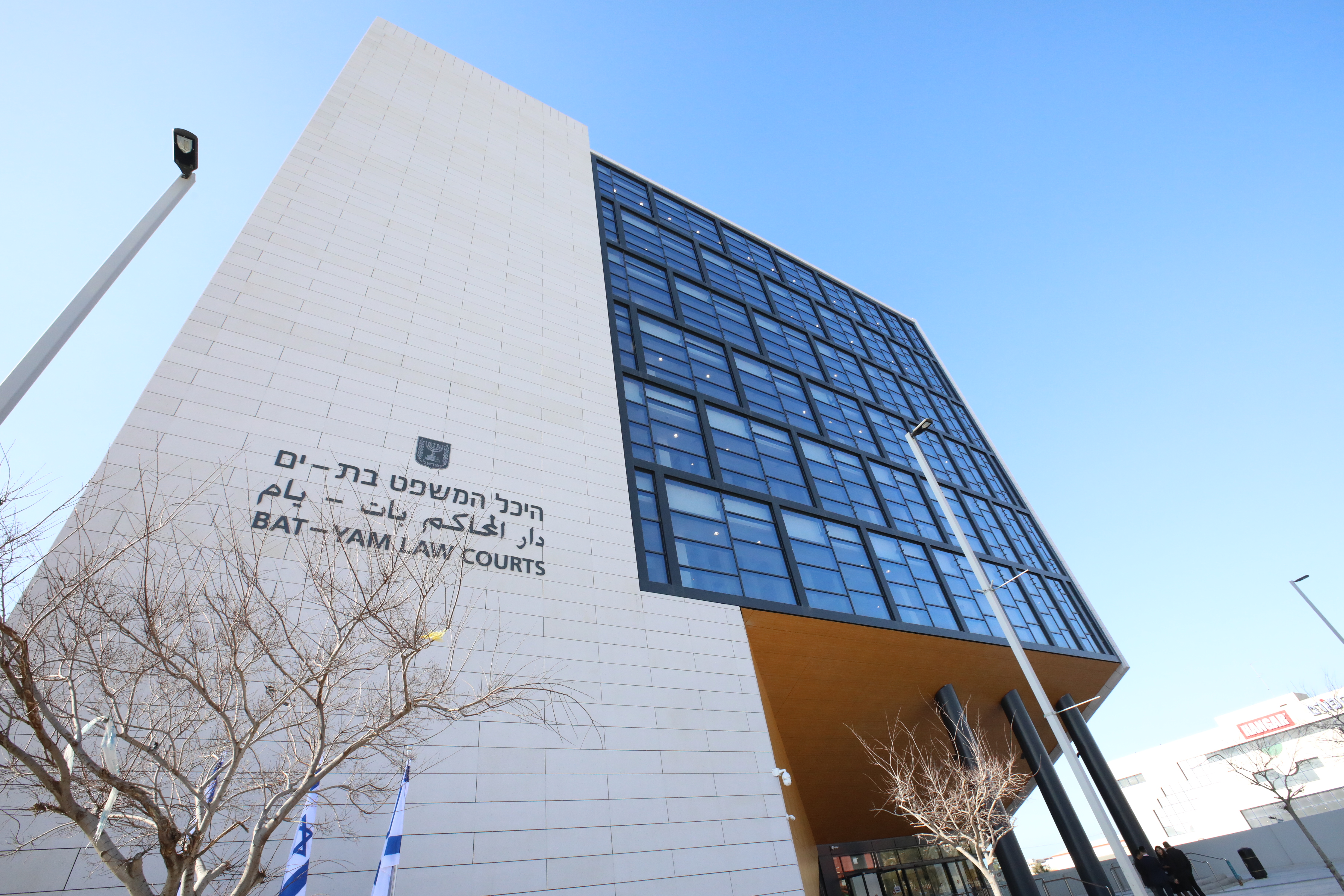 תמונת שצולמה על ידי דוברות הרשות השופטת, חזית מבנה היכל המשפט בת ים אשר מכיל בתוכו את ביה"ש לתעבורה של מחוז תל אביב החל מפבואר 2020